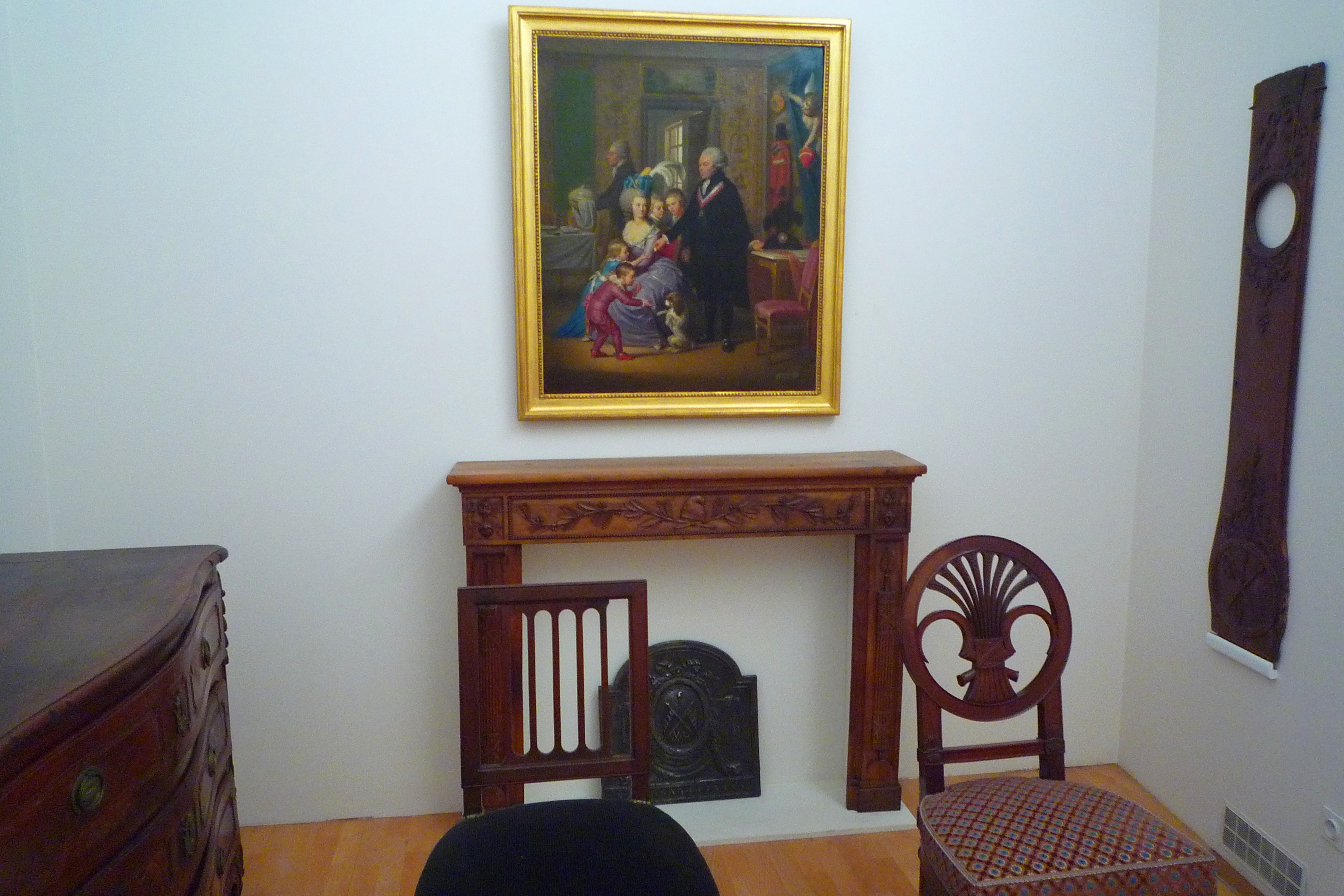 Annexe de la salle des arts, niveau 1 du musée de la Révolution française - Vizille. Tableau : Le juge Pierre-Louis-Joseph Lecoq et sa famille (1791) par Dominique Doncre.